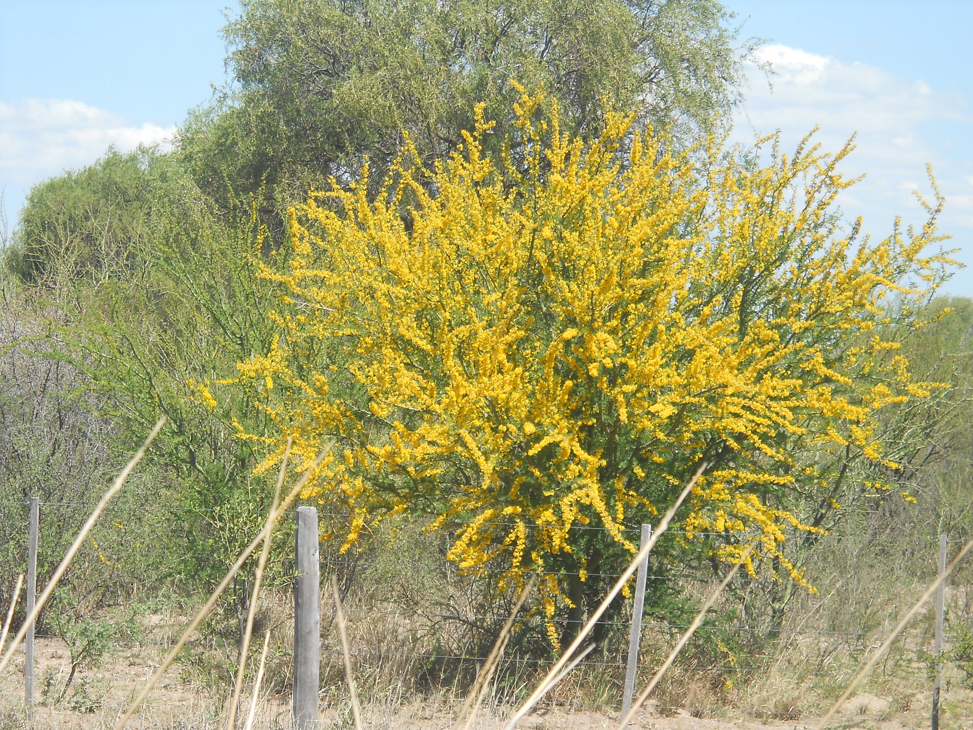 Arbol brea